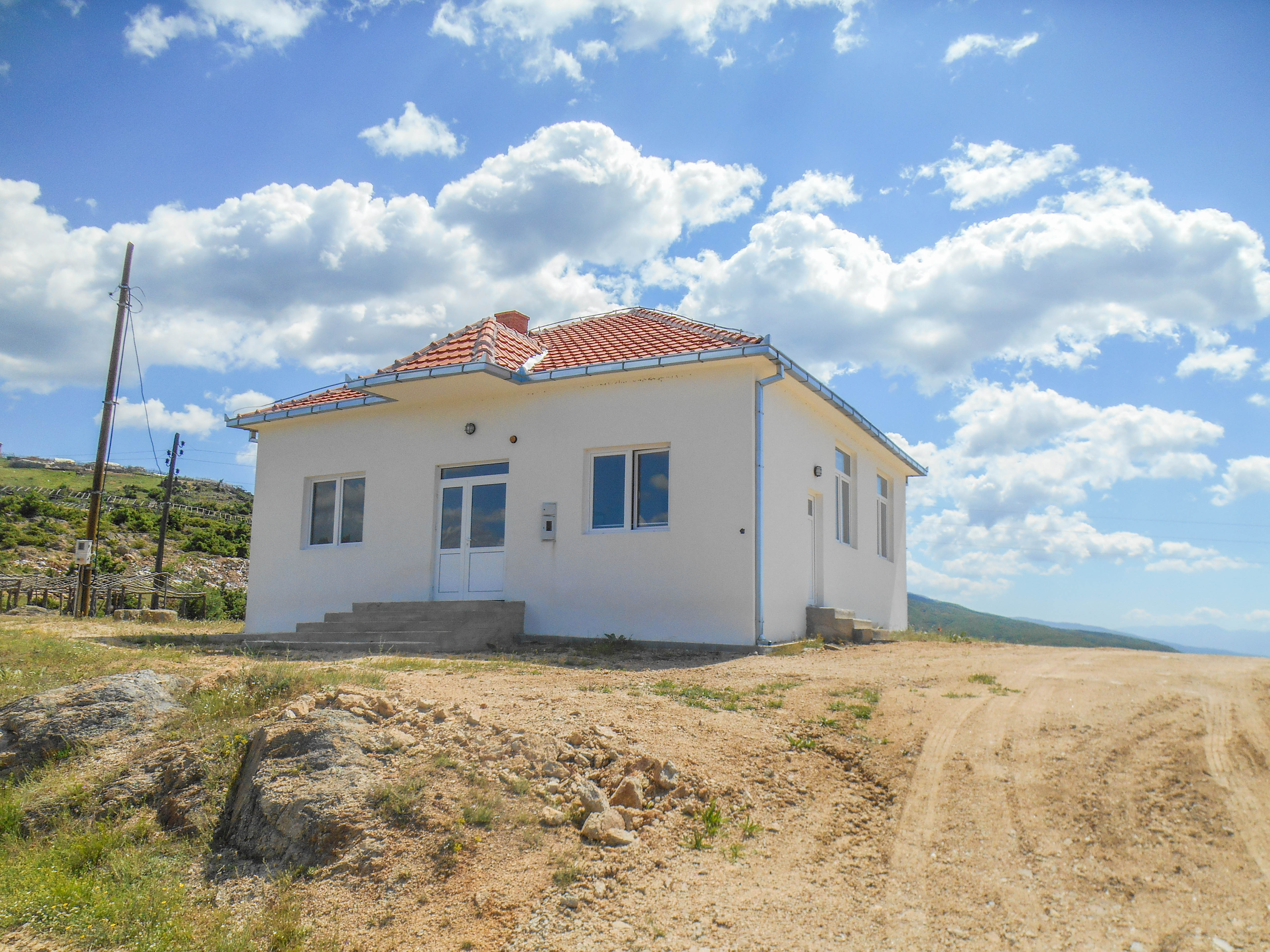 Основно училиште „Атанас Нивичански“ - Висока Маала